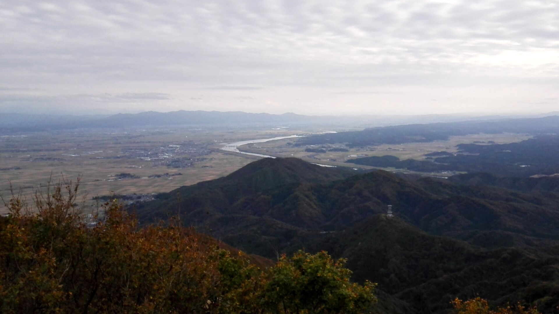 弥彦山頂上から撮影